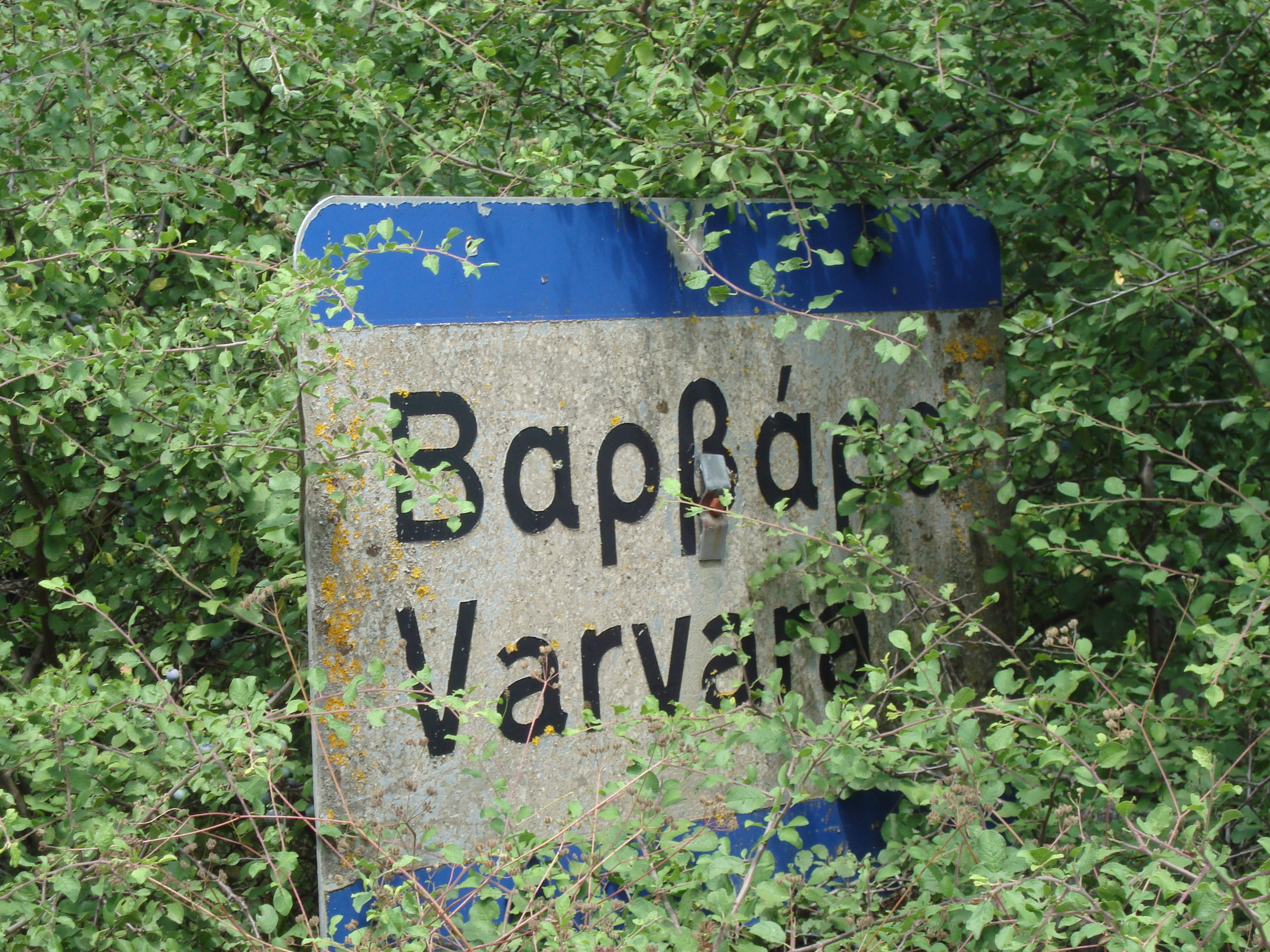 Ταμπέλα στην είσοδο της Βαρβάρας Χαλκιδικής